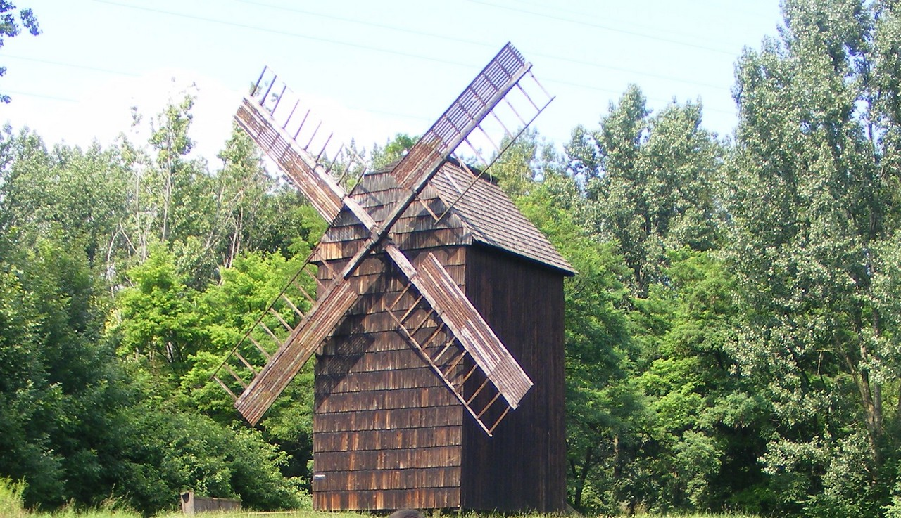 SKANSEN. ZABYTKOWY WIATRAK.